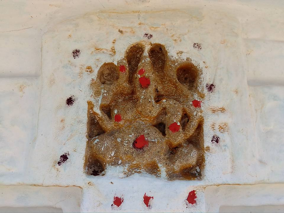 మఠంగూడెం పురాతన శివాలయంలో లలాట బింబంగా వినాయకుడు